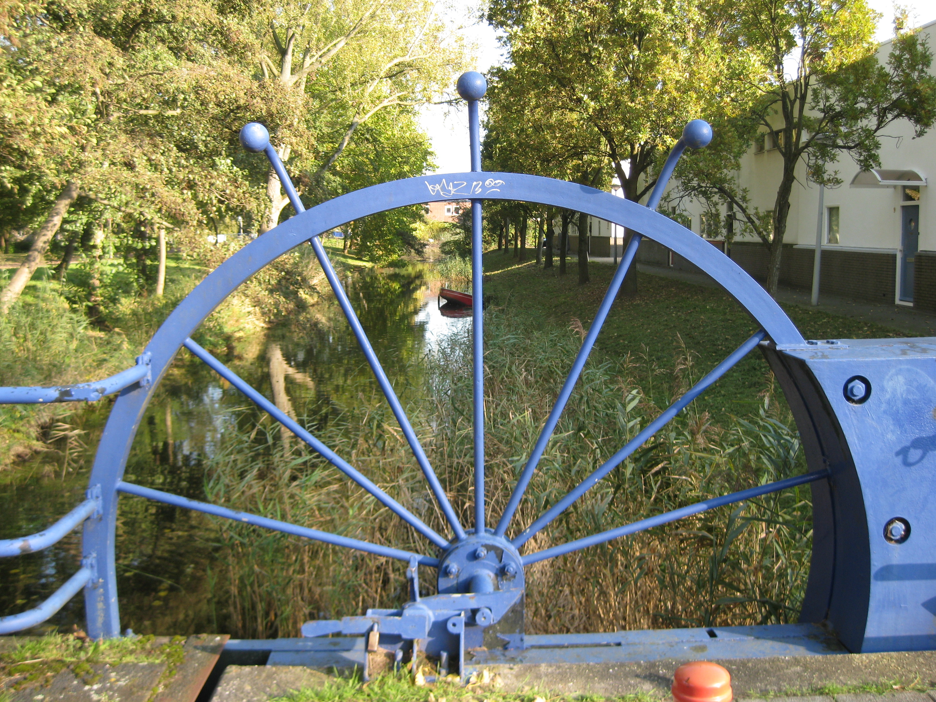 Blauwe brug (626), Eendrachtspark, Albardagracht/Nellie van Kolstraat/Nannie van Wehlstraat, Amsterdam - Nieuw-West